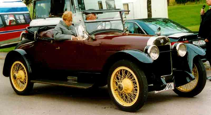 Buick Model 22-54 Sport Roadster 1922